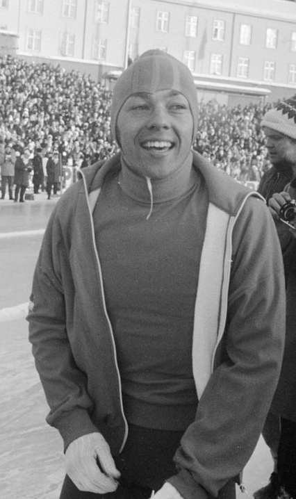 Wereldkampioenschappen Schaatsen te Oslo (Noorwegen). Eddy Verheijen